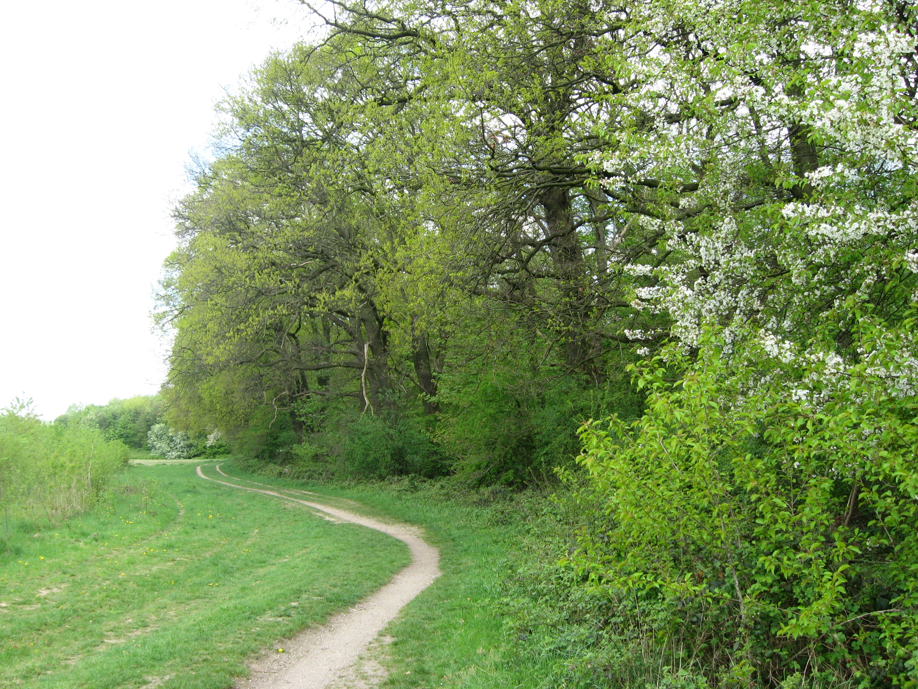 Landschaftsschutz- und Naherholungsgebiet Bieselwald Datum: 17.04.2011 Urheber: M. Pfeiffer alias Benutzer:Gordito1869 Quelle: privates Fotoarchiv des Urhebers